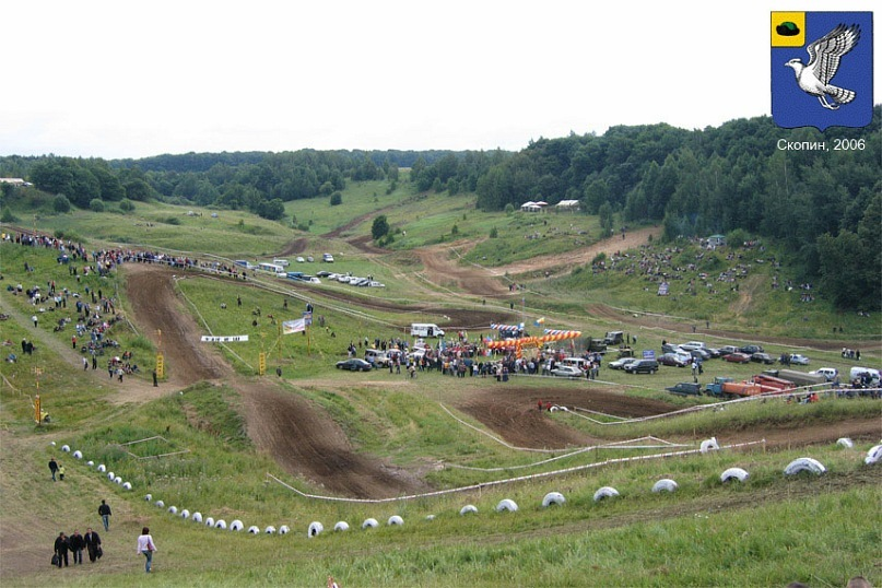 Мотокросс в Скопине